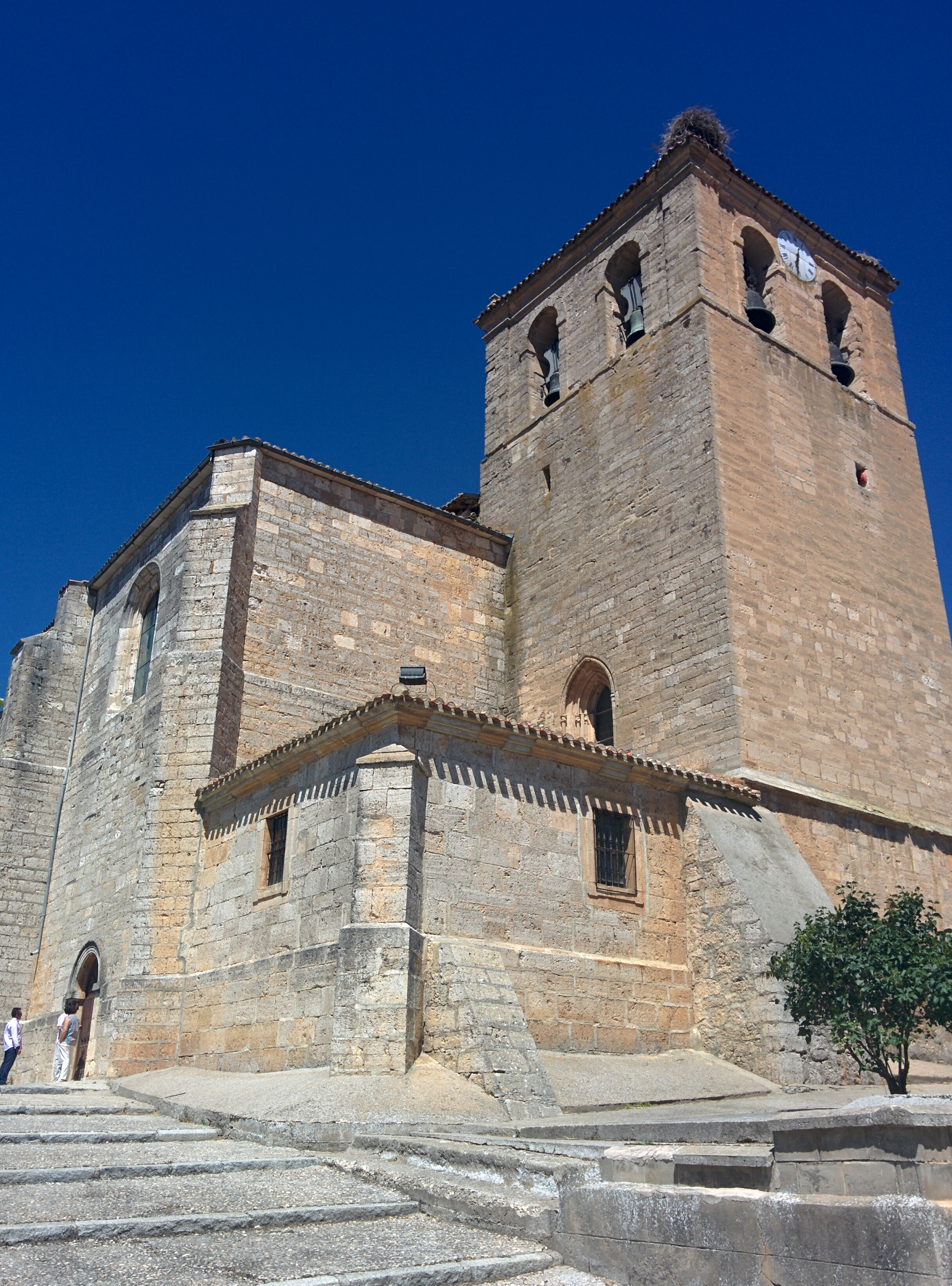 Iglesia de la Asunción de Nuestra Señora, en Tardajos (Burgos, España).